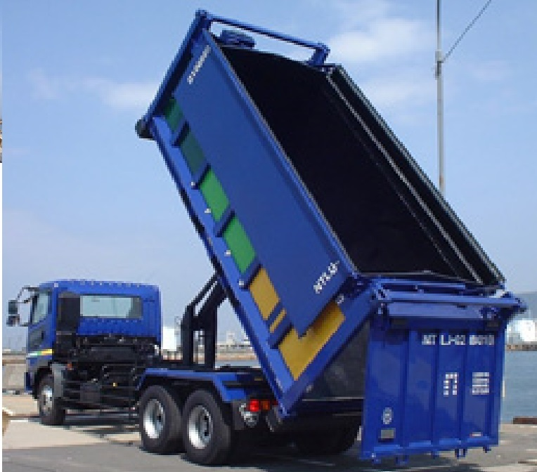 もう人々の記憶も薄れてしまっている香川県の豊島異邦廃棄物問題。運び出し専用に使われてきた特殊な密閉タイプの国際コンテナ仕様が使われ出してもう十年以上も経ったのでそろそろ腐食などで痛み始めた。その交換用で先月新しいコンテナが四個入って来てお披露目のデモンストレーションがありました。 輸送担当は相変わらず日通が担当です。コンテナカラーは受け入れ側の直島カラーである『海の青』塗装になっていました。 《注》カメラの設定を間違えて小サイズの画像を無理やり拡大したので画質が荒くなっています。すいません。